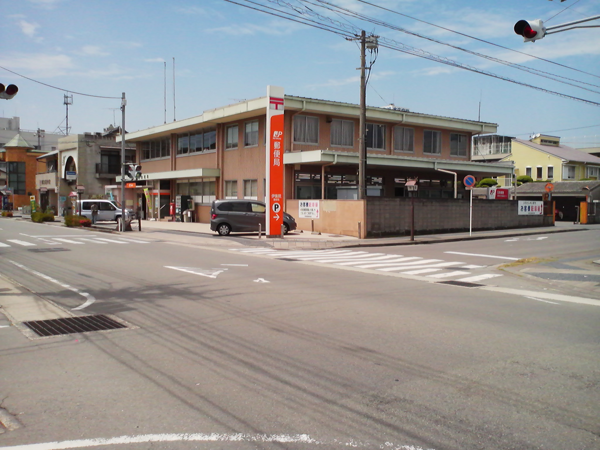 伊集院郵便局の外観